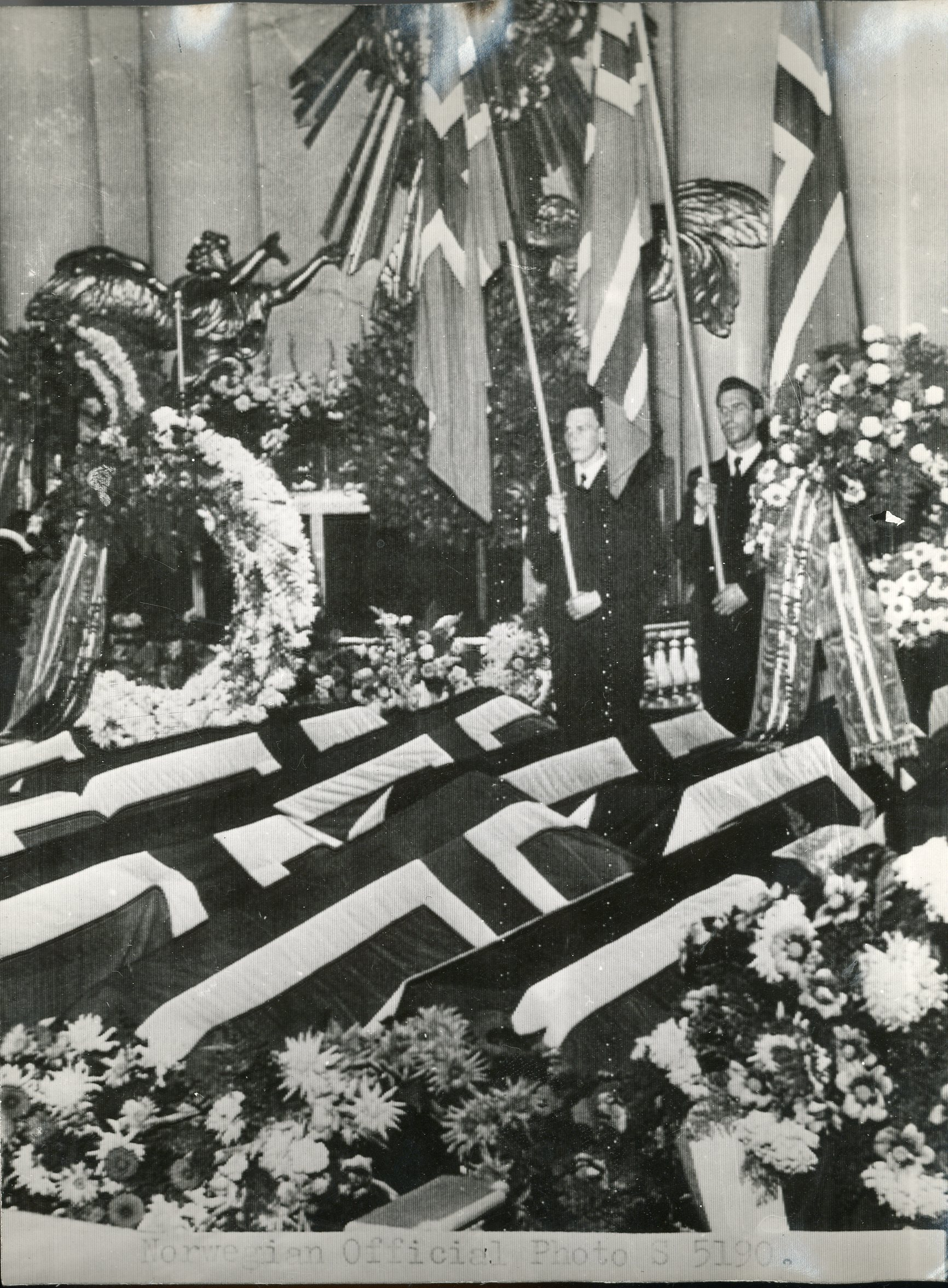 Det tyske fangeskipet ”Westfalen” hadde da det ble senket på vei mellom Norge og Tyskland ca. 50 norske fanger om bord. 35 av de omkomne nordmenn ble ført på marinefartøyet ”Ven” til Gøteborg, hvor kistene ble anbragt i Domkirken. Her fant det sted en minnehøytidelighet, og kirken var fylt til siste plass. Tilstede var norske og svenske myndigheter samt representanter for allierte og nøytrale konsulater. Mens den gripende høytidelighet fant sted, sto 6 unge nordmenn med norske flagg ved bårene. Mange slektninger og pårørende av de omkomne var kommet til stede fra forskjellige kanter av Sverige, og til alle bårer var det blomster og kranser fra slekt og venner i Sverige. S.5190: Fra minnehøytideligheten i Domkirken over de norske ofrene fra ”Westfalen”.London, 2.10.44. Engelsk billedtekst: The burial of Norwegians killed on board ”Westfalen”The German prison ship ”Westfalen”, carrying some 50 Norwegian prisoners, was sunk en route from Norway to Germany. The bodies of 35 of the 45 Norwegians who lost their lives were brought to the Cathedral at Göteborg on the 14th of September, 1944, and buried with full military honours. Picture shows the 35 coffins in the Cathedral, flanked by Norwegian flags. London 27.9.44. RA/PA-1209/Uc/67/1/S 5191